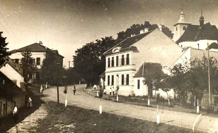 Hradčovice